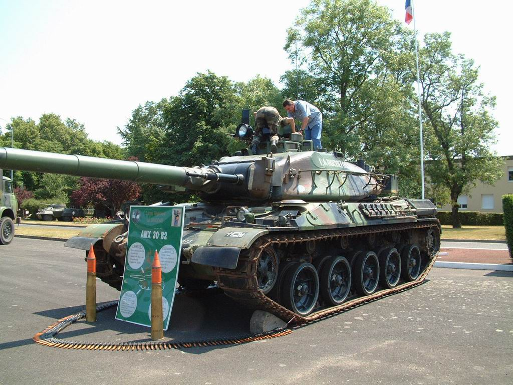 Je suis Alain Servaes l'auteur de la photo, elle provient de ma base de données photos. Depuis plusieurs années, je voyage dans de nombreux pays pour couvrir des événements militaires et prendre des photos des véhicules blindés et équipements militaires. Ceci est un AMX-30B2, une version améliorée de la version de base de l'AMX-30. J'ai également créé un site internet sur les équipements et véhicules blindés en usage dans le monde.